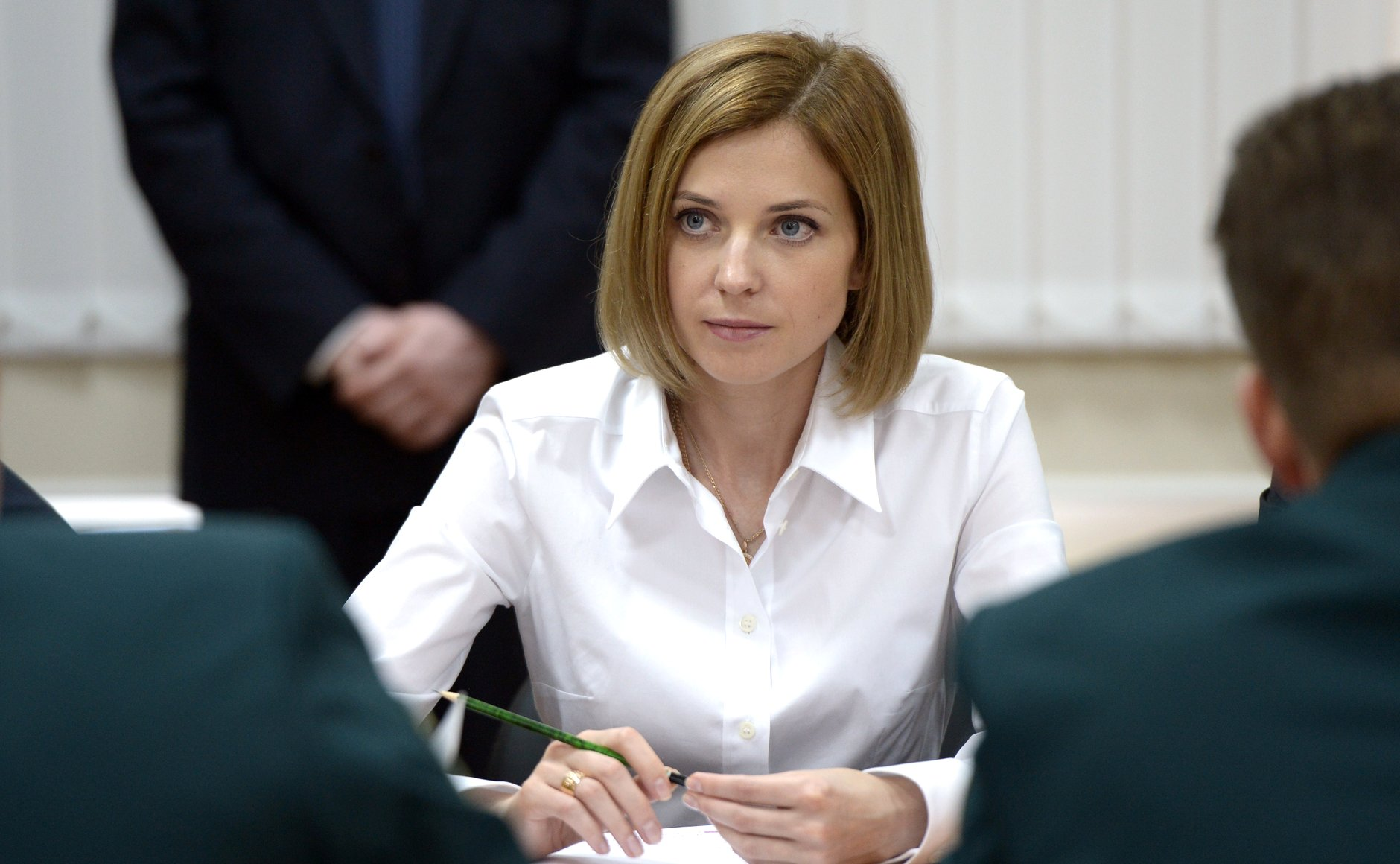 Прокурор Республики Крым Наталья Поклонская перед началом совещания по вопросам обеспечения законности и правопорядка в Крымском федеральном округе